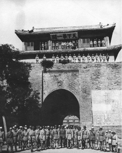 1945年8月23日冀热辽军区第12、18团等部队解放山海关。俘日伪军2000 余人，缴步枪3000 余支、机枪70 挺、子弹100余万发。